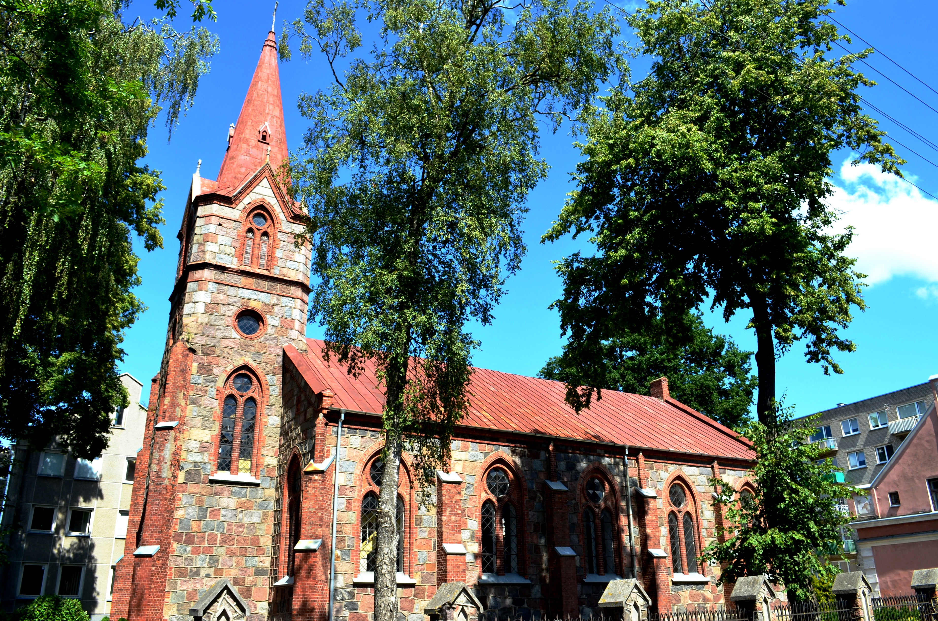 Kretingos liuteronų bažnyčia